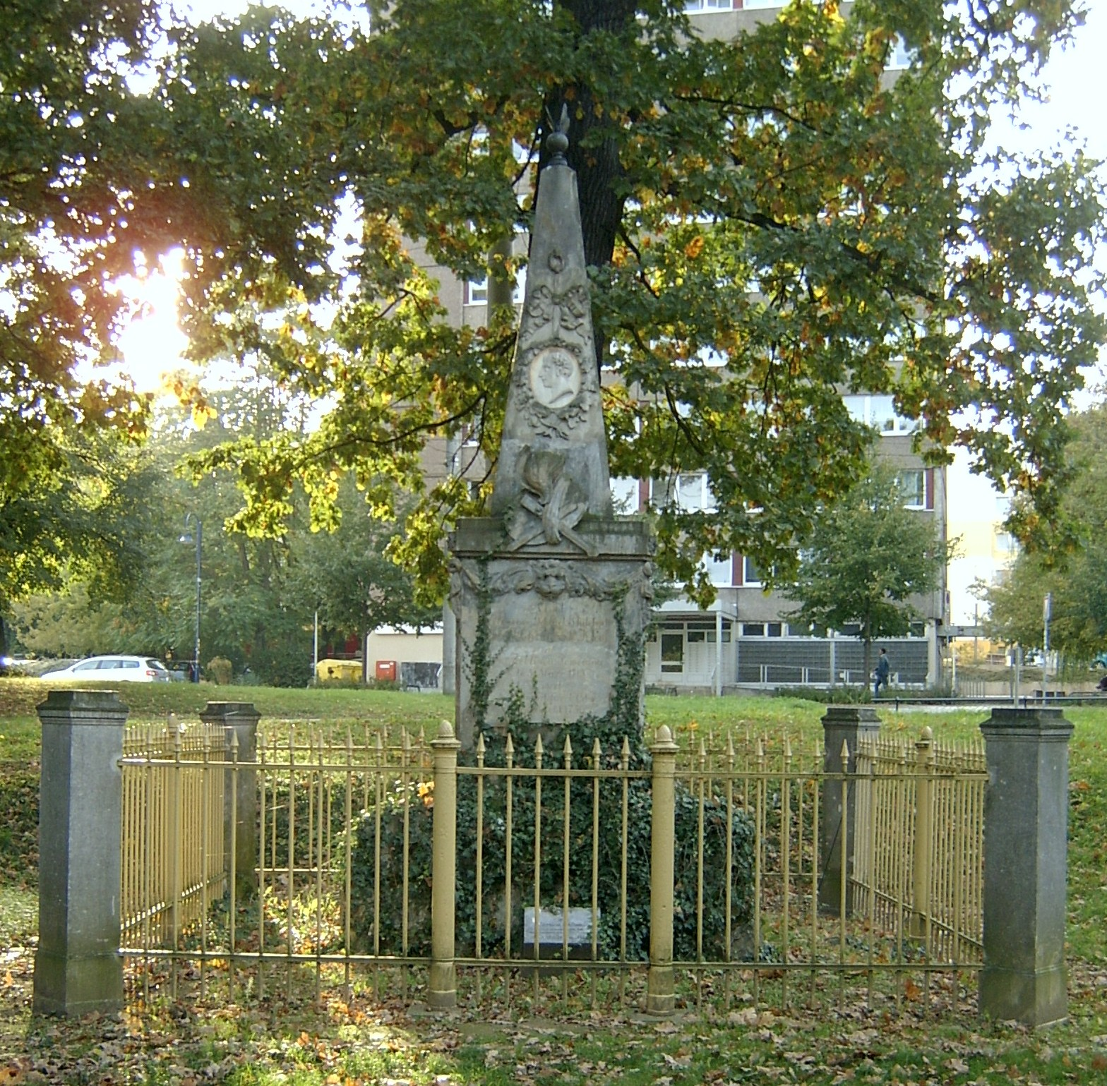 Denkmal von Ewald Christian von Kleist. Gelegen im Park nördlich der Gertraudenkirche. Das Heinrich von Kleist Denkmal liegt gegenüber, das Joachim Georg Darjes und dessen Frau Marta Friderica Reichardt-Denkmal links daneben Denkmäler in Frankfurt (Oder)